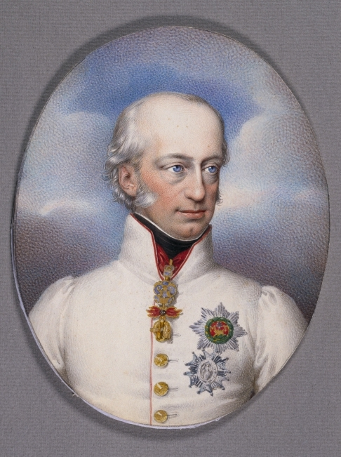 Großherzog Ferdinand III. von Toskana.